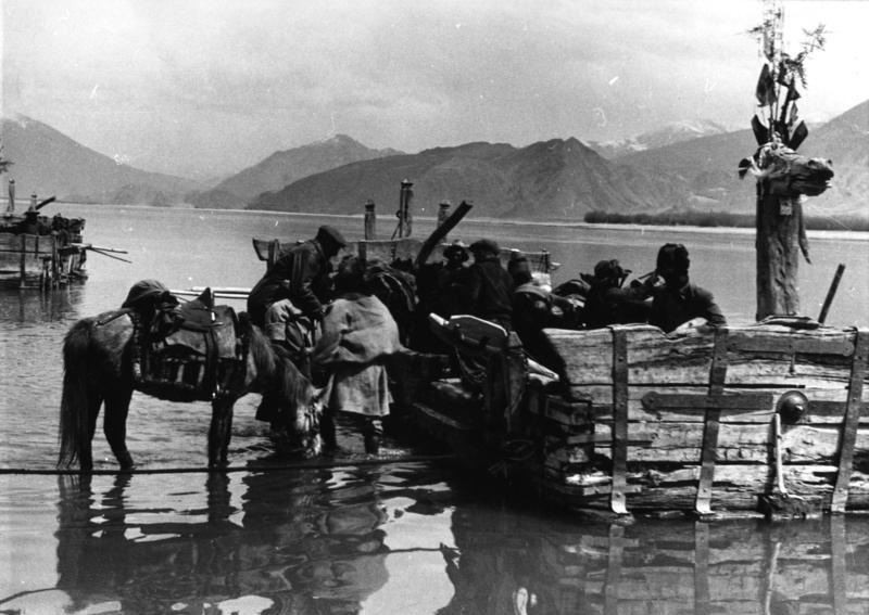 Netong, Flussüberquerung